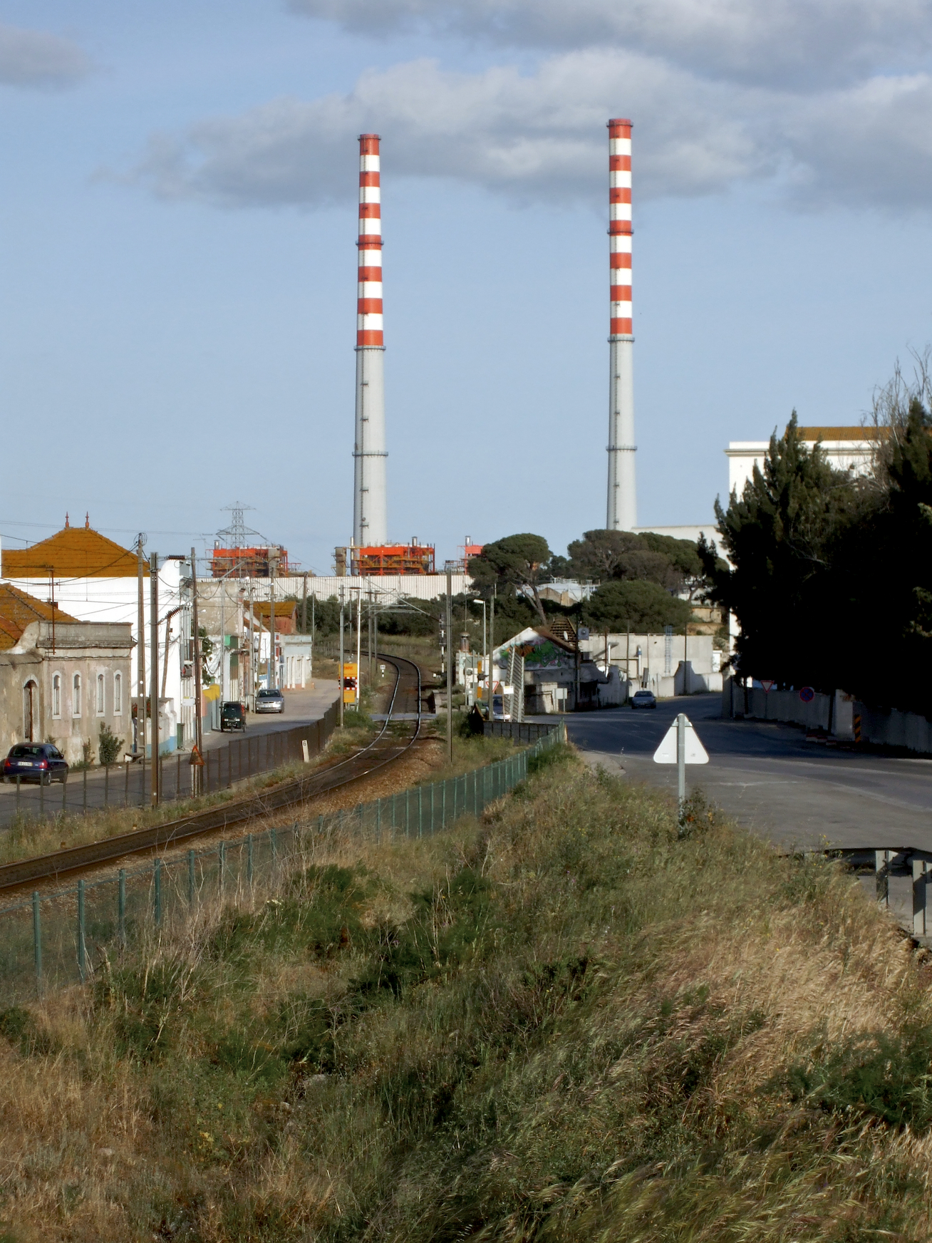 Via férrea: Linha do Sul [PK 31] Local: Setúbal (Cachofarra) Data e hora: 7 de Abril de 2009 [18h28] Sentido: Tunes